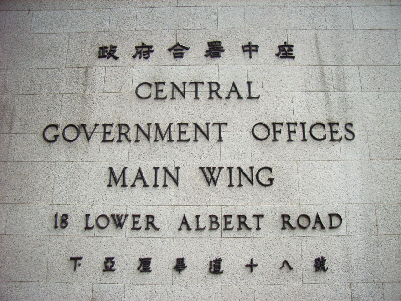 No. 18 Lower Albert Road, Hong Kong 下亞釐畢道18號 AlbertCotton